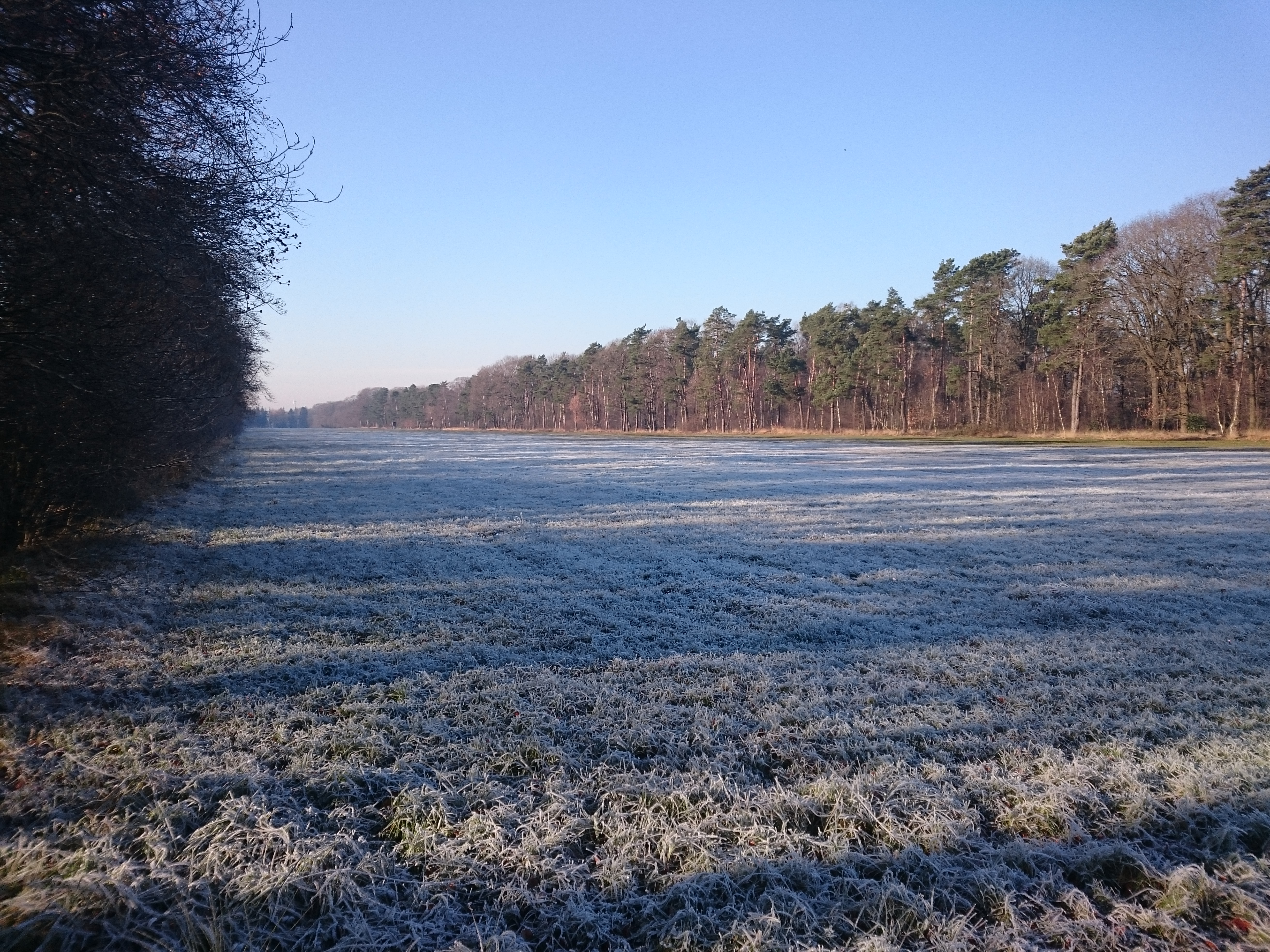 Lichtung zwischen dem Schwatten Gatt (rechts) und dem Provinzbusch (links).